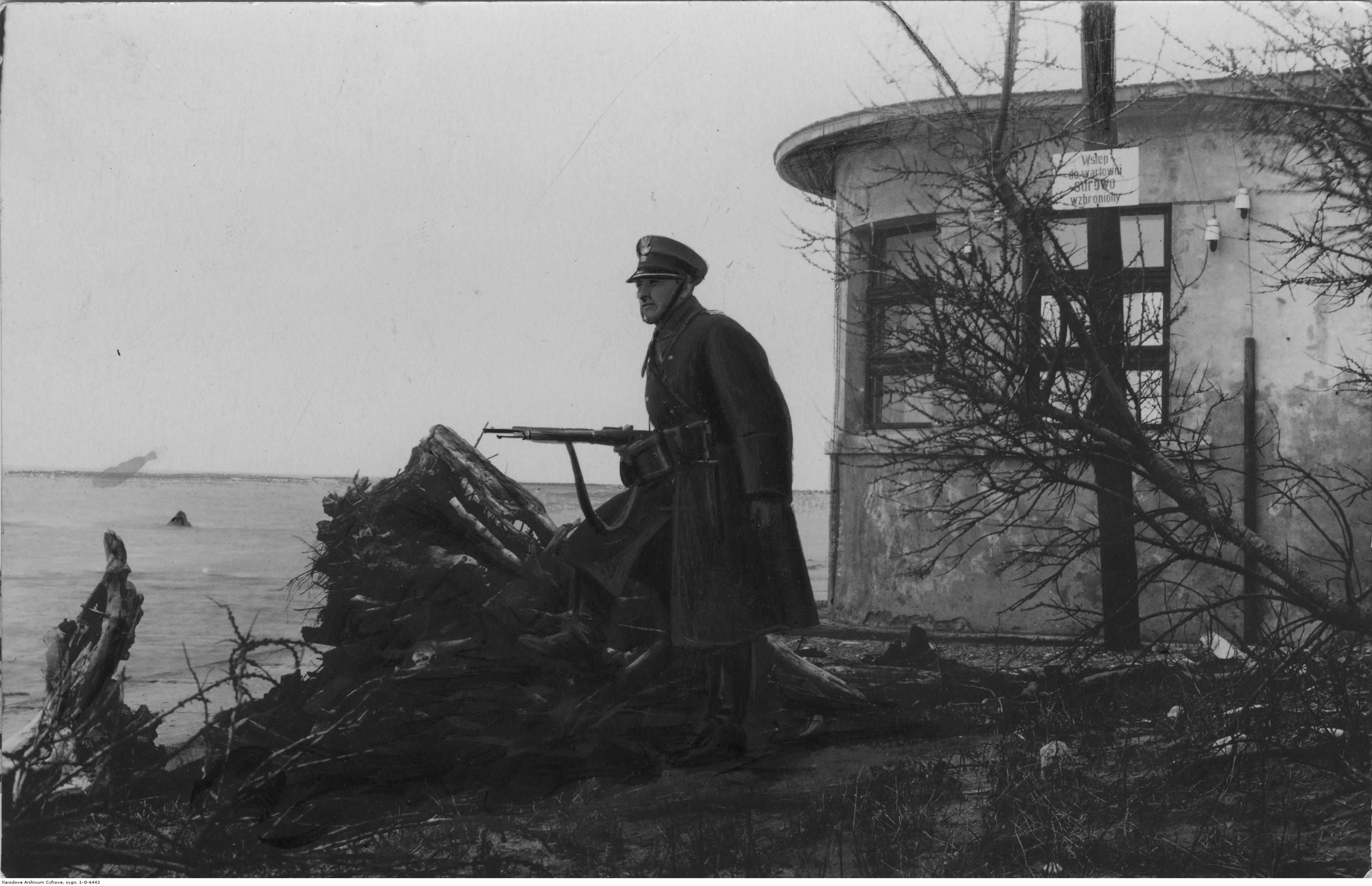 Posterunek Straży Granicznej koło Rozewia. Koncern Ilustrowany Kurier Codzienny - Archiwum Ilustracji. Sygnatura: 1-G-6442